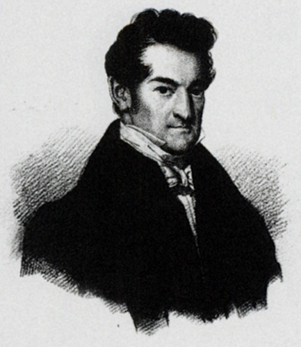 Hübler als Mitglied des ersten konstitutionellen sächsischen Landtags 1833/34